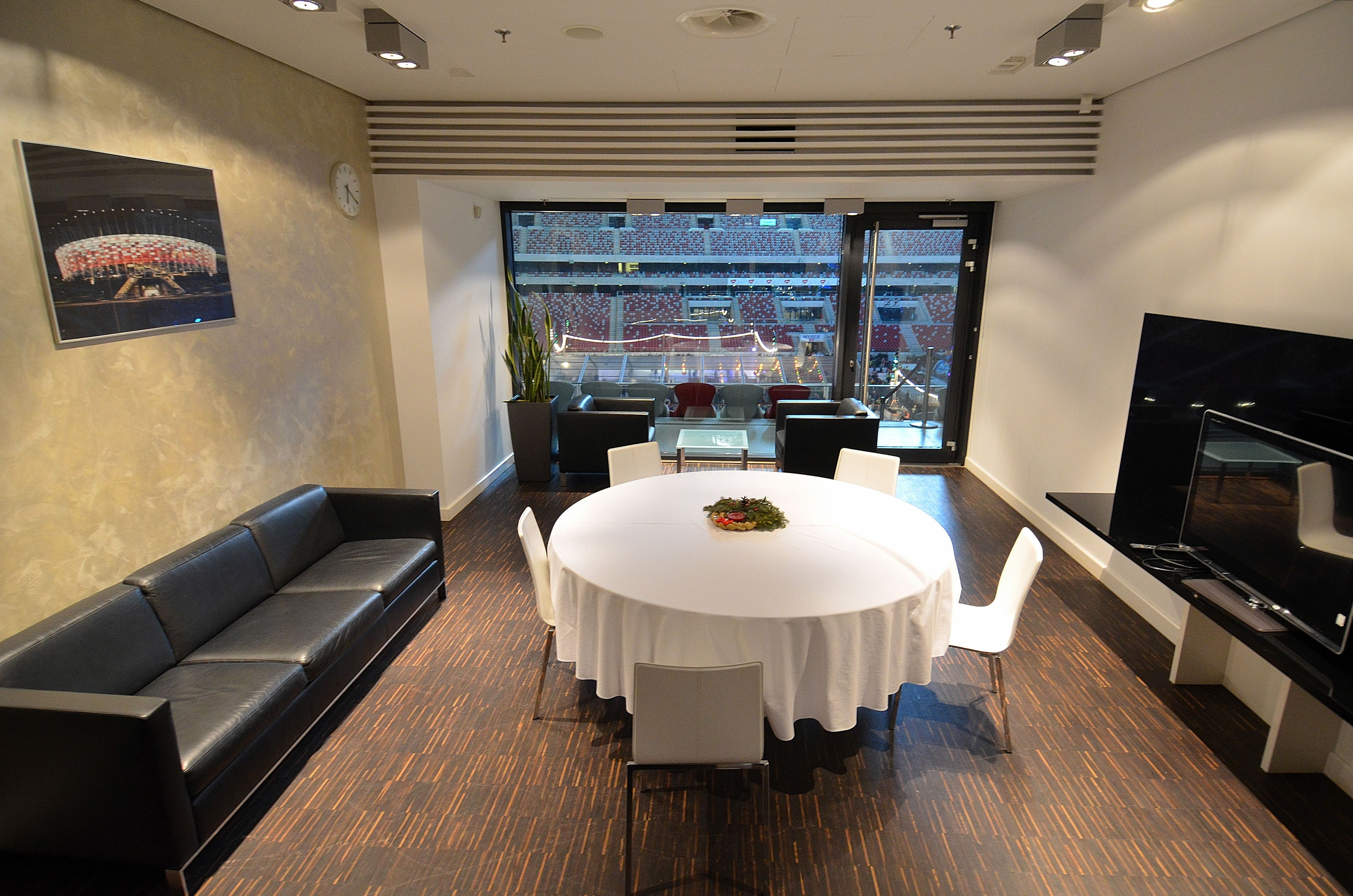 Jedna z lóż VIP na Stadionie Narodowym w Warszawie